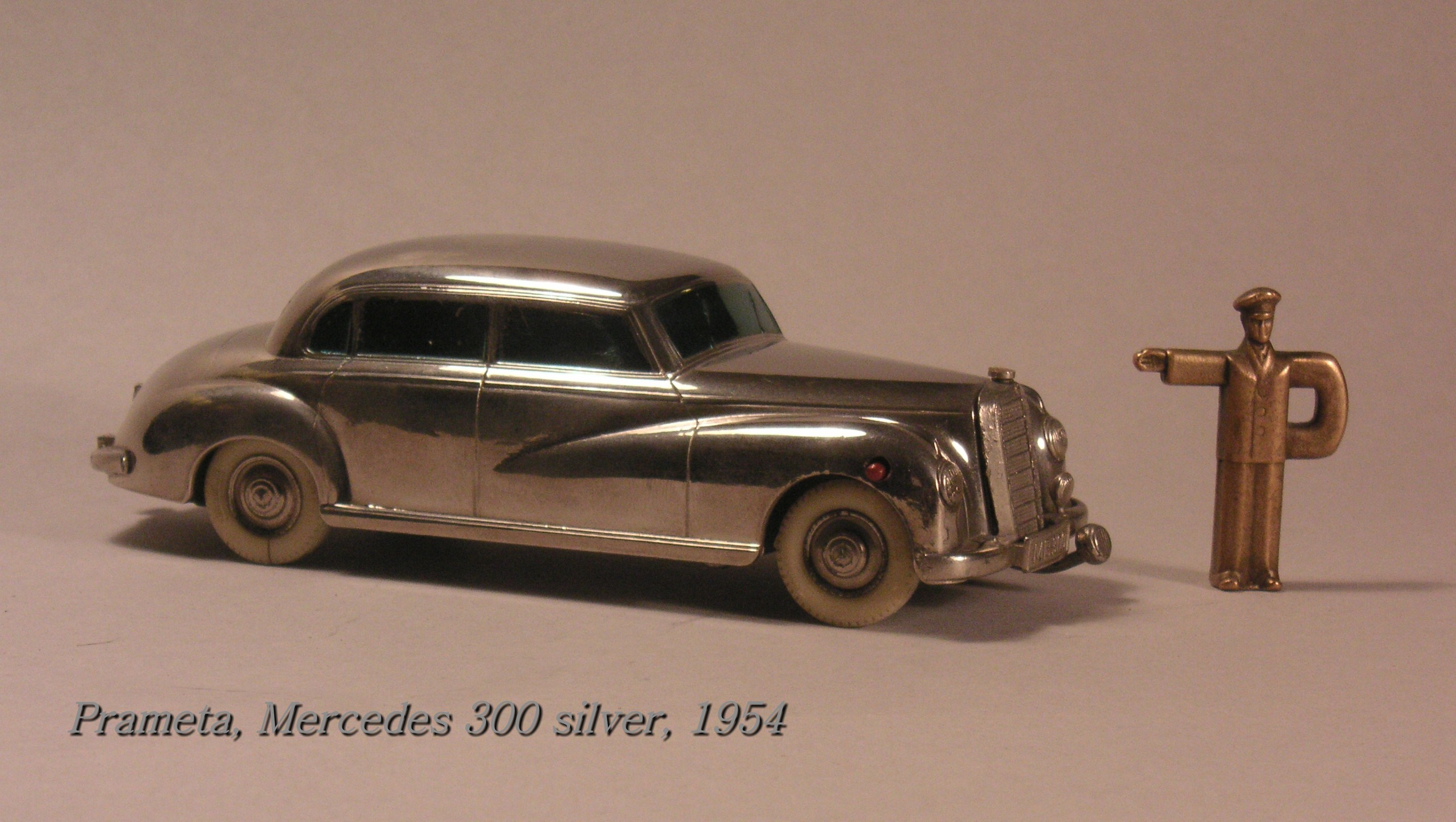 Prämeta "Mercedes 300, Adenauer" silver